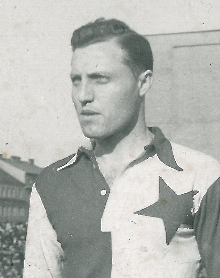 Bohumil Říha